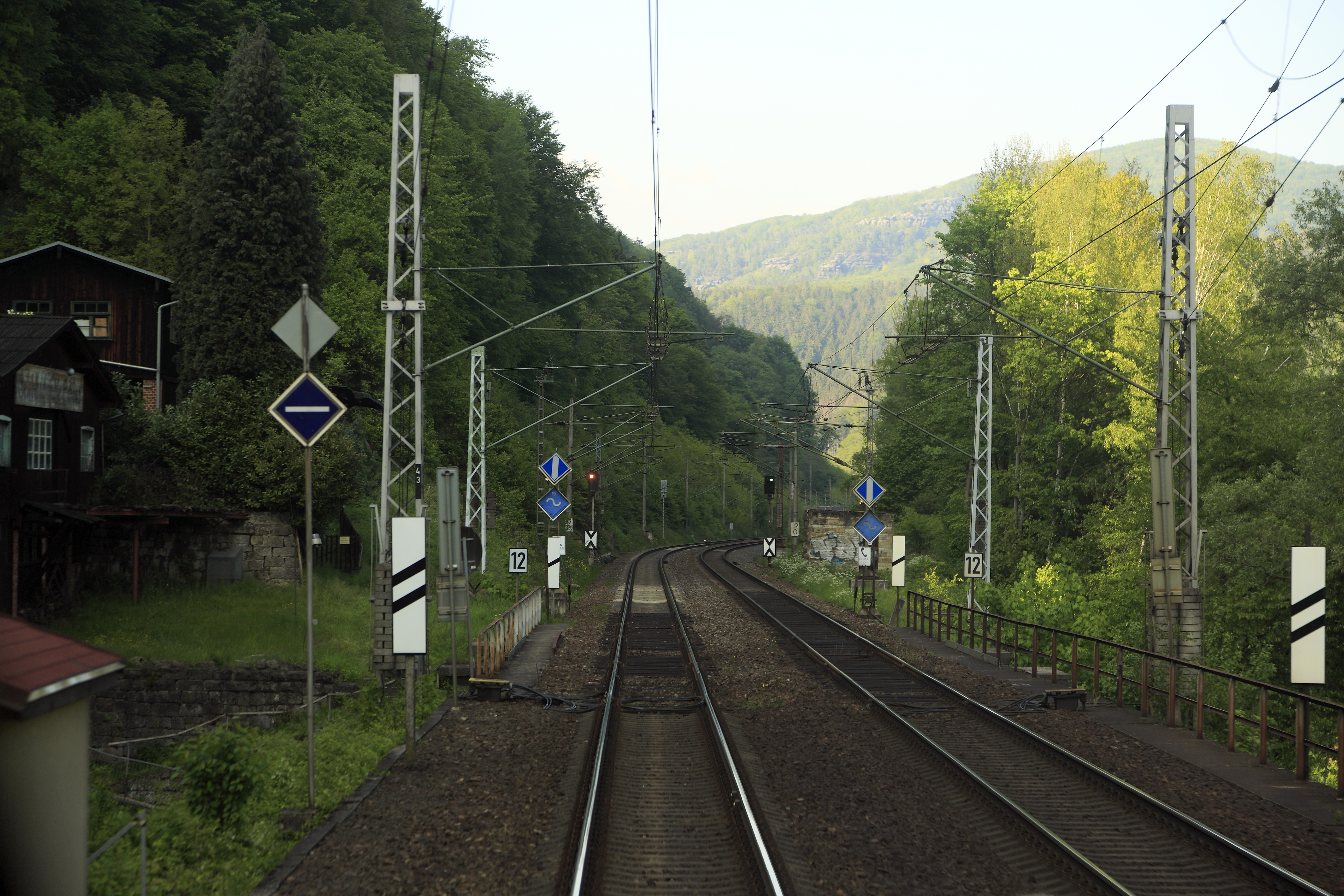 Der neutrale Abschnitt der Systemtrennstelle liegt unmittelbar über der Grenzbrücke über den Gelobtbach. Auf den zweiten Blick fallen die rückstrahlenden Bügel- ab- (El 4) und Bügel-an-Signale El 5 auf. Ursprünglich wurde an dieser Systemtrennstelle nicht abgebügelt, sondern nur der Hauptschalter ausgeschaltet, zumal die Fahrleitungsgeometrie und das Schleifleistenmaterial in Deutschland und Tschechien gleich sind. Offenbar fuhren Lokfüher versehentlich mit zwei gehobenen Stromabnehmer in die Systemtrennstelle und verursachten damit Erdschlüsse. Die neutralen Abschnitte bestehen nur aus je einem langen Streckentrenner, bei beiden benachbarten Masten sind die Ausleger nicht isoliert.